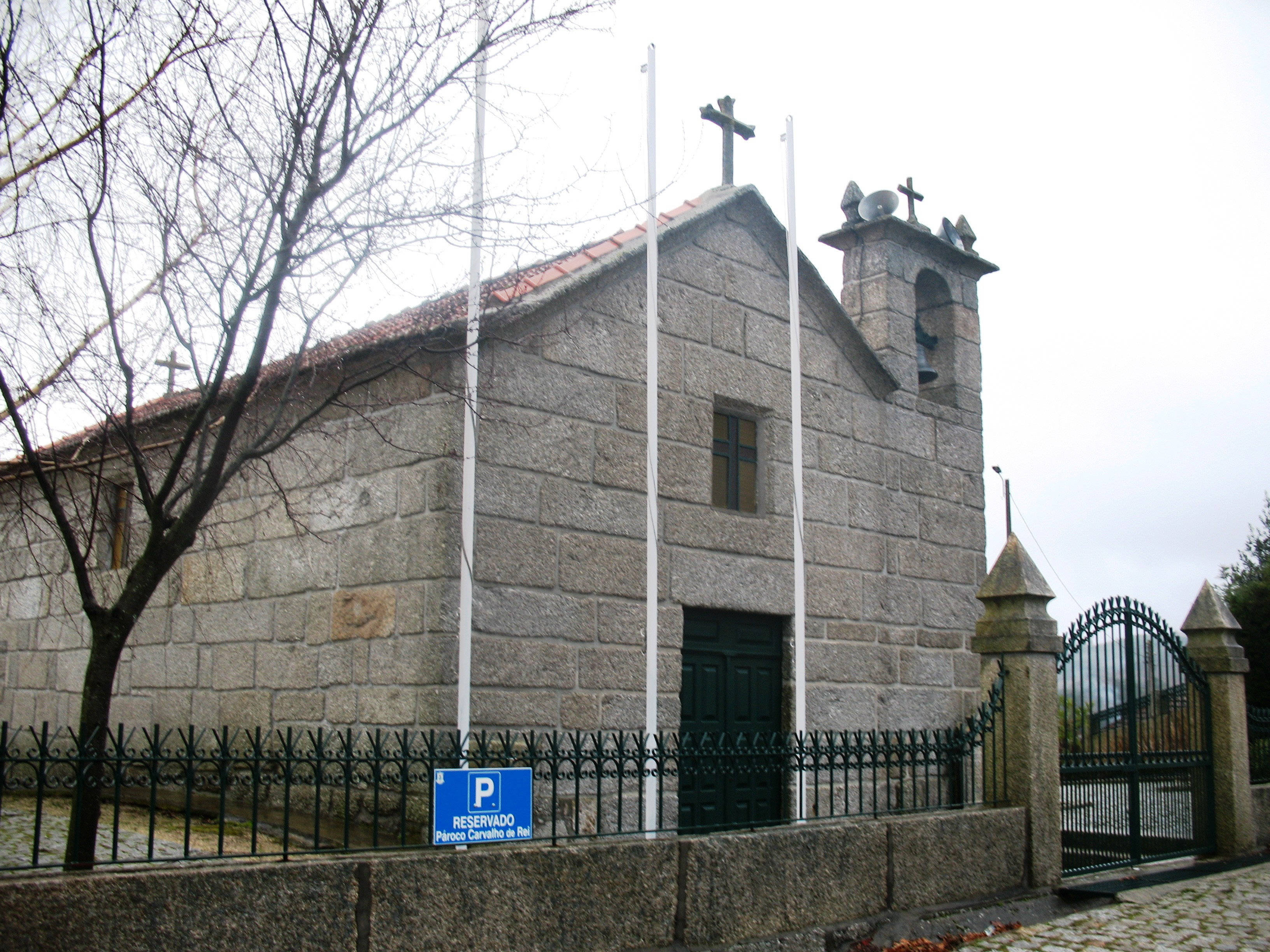 Amarante Igreja Matriz de Carvalho de Rei